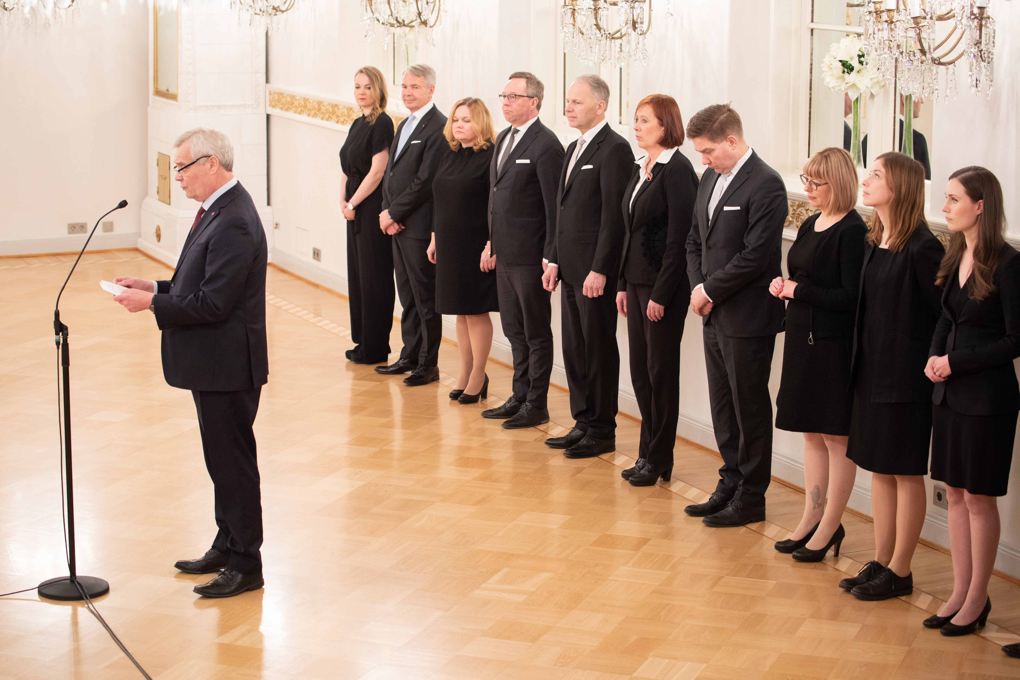 Rinteen hallitus jäähyväiskäynnillä Presidentinlinnassa. © Kosti Keistinen / valtioneuvoston kanslia